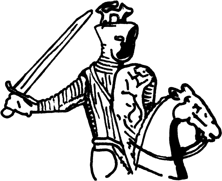 sceau équestre du comte Baudouin IX de Flandre